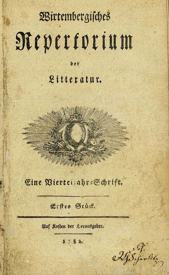 Titelblatt Wirtembergisches Repertorium der Litteratur, 1. Stück 1782